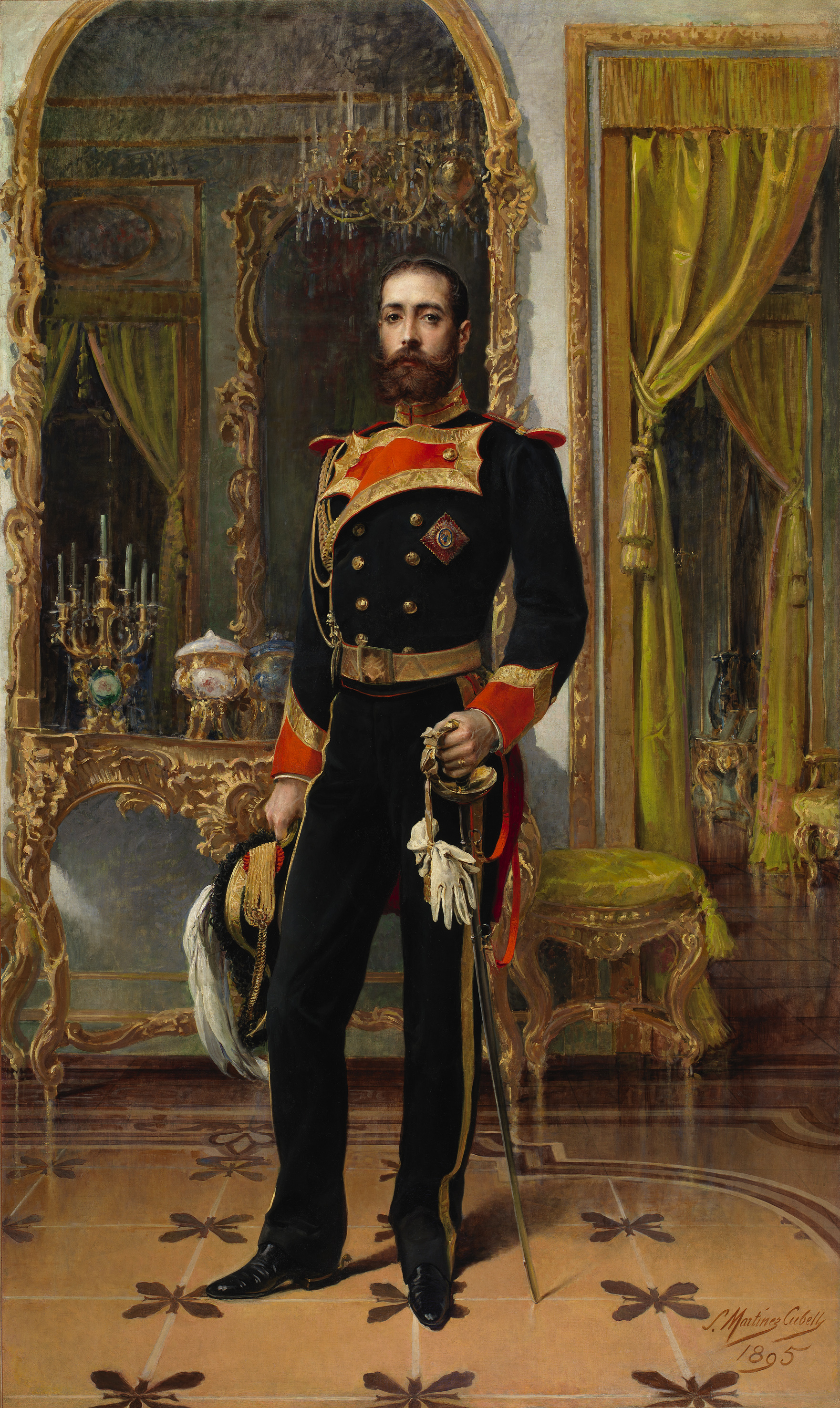 Retrato del aristócrata español José Martínez de Roda (1855-1899), que fue marqués de Vistabella y senador del reino. El cuadro fue legado en 1960 al Museo del Prado por María Josefa Barrios y Aparicio, marquesa de Vistabella. El retratado viste el uniforme de caballero de la Real Maestranza de Caballería de Ronda.